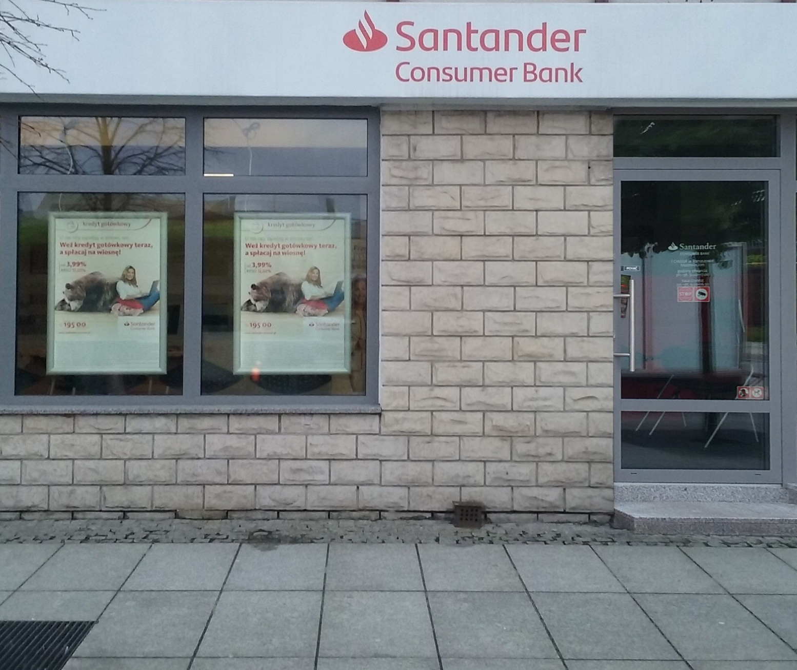 Hiszpański Santander Consumer Bank w Tomaszowie Mazowieckim w województwie łódzkim